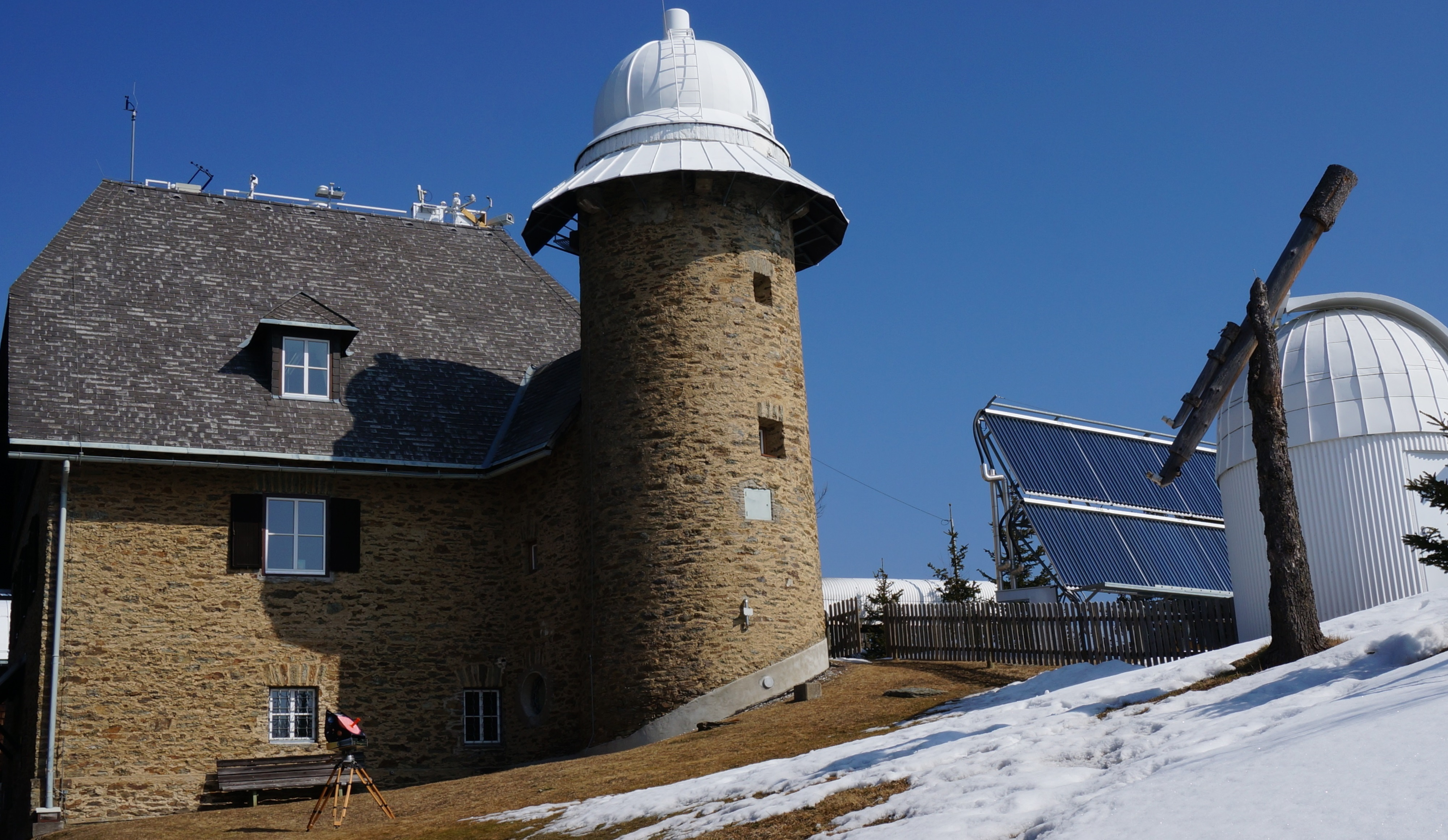 Observatorium "Kanzelhöhe" Gerlitzen, Villach für Sonnen- und Umweltforschung der Karl-Franzens-Universität Graz